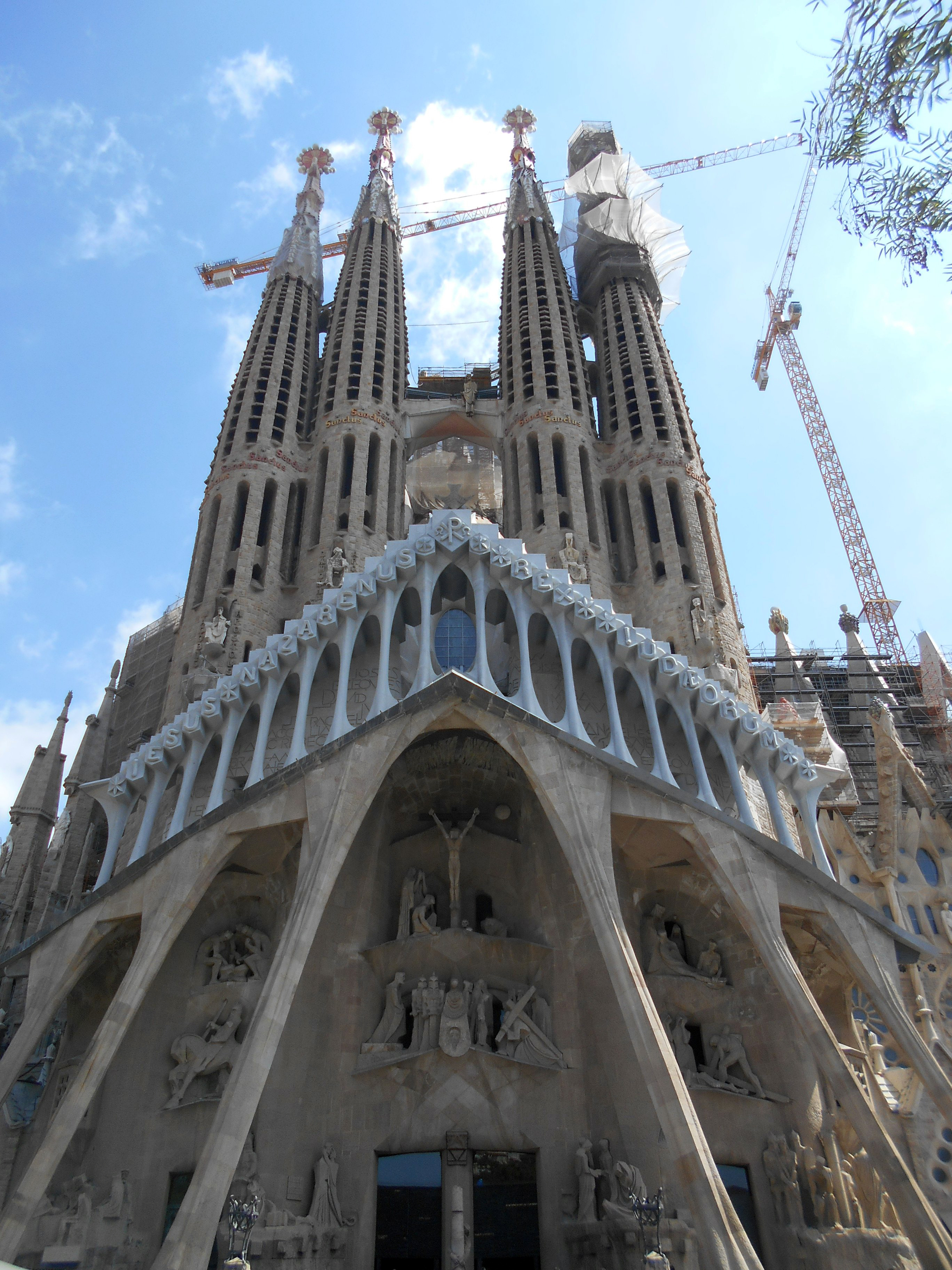 Fachada de la Pasión (2016).